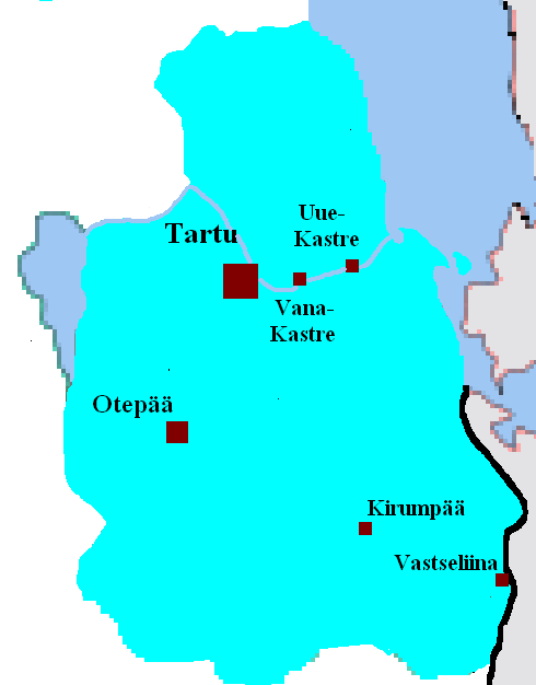 Tartu piiskopkonna kaart